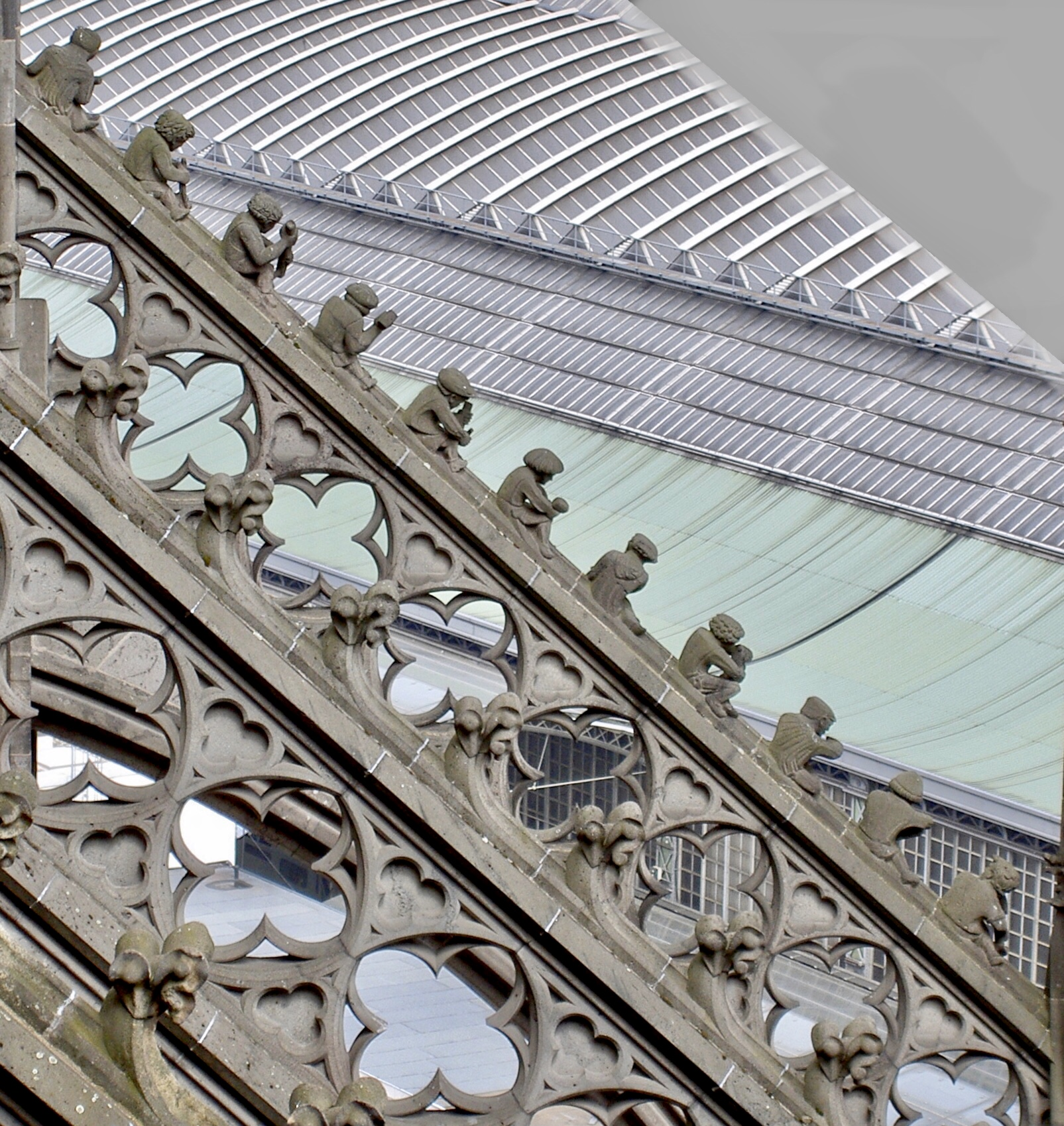 Handwerkerfiguren auf einem Strebebogen des Kölner Doms